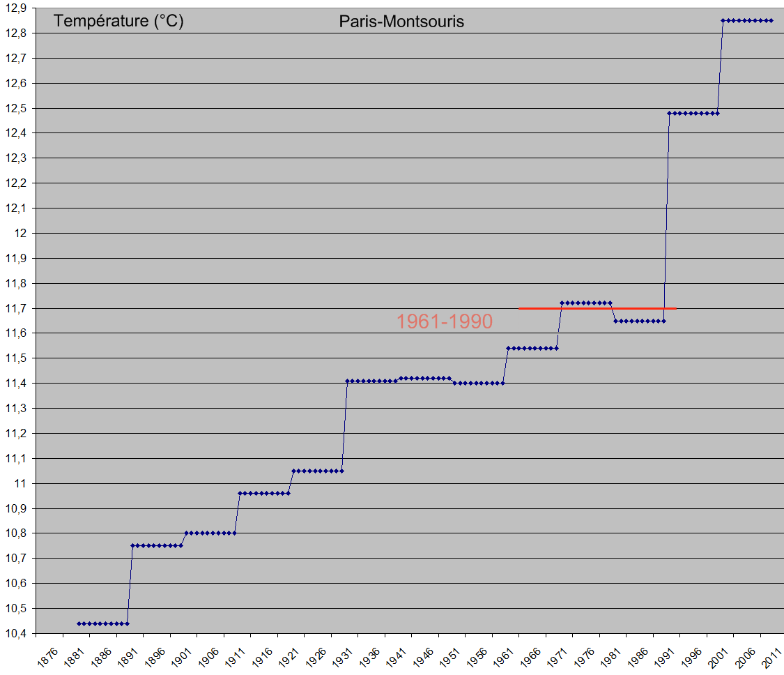 Température moyenne par décade annuelle à Paris-Montsouris de 1879 à 2008.